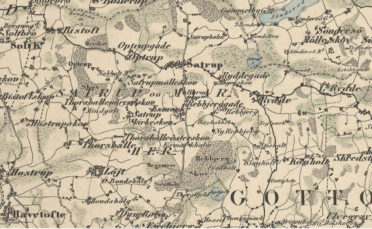 Udsnit med det centrale Angel, fra: Videnskabernes Selskabs Kaart over Slesvigs Fastland og Als 4, østre blad